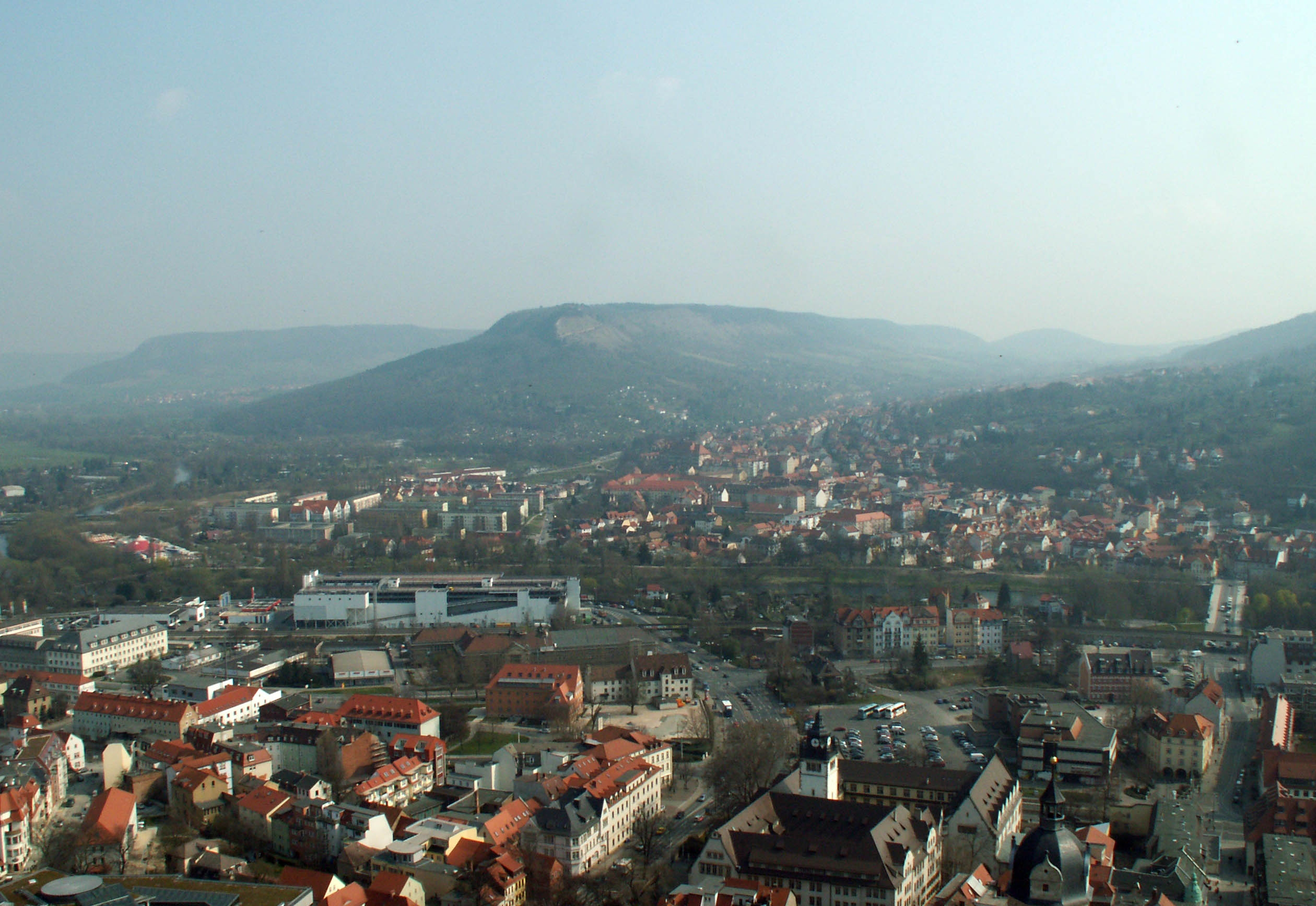 Jena, Blick vom JenTower (Intershop Tower) auf die Stadt